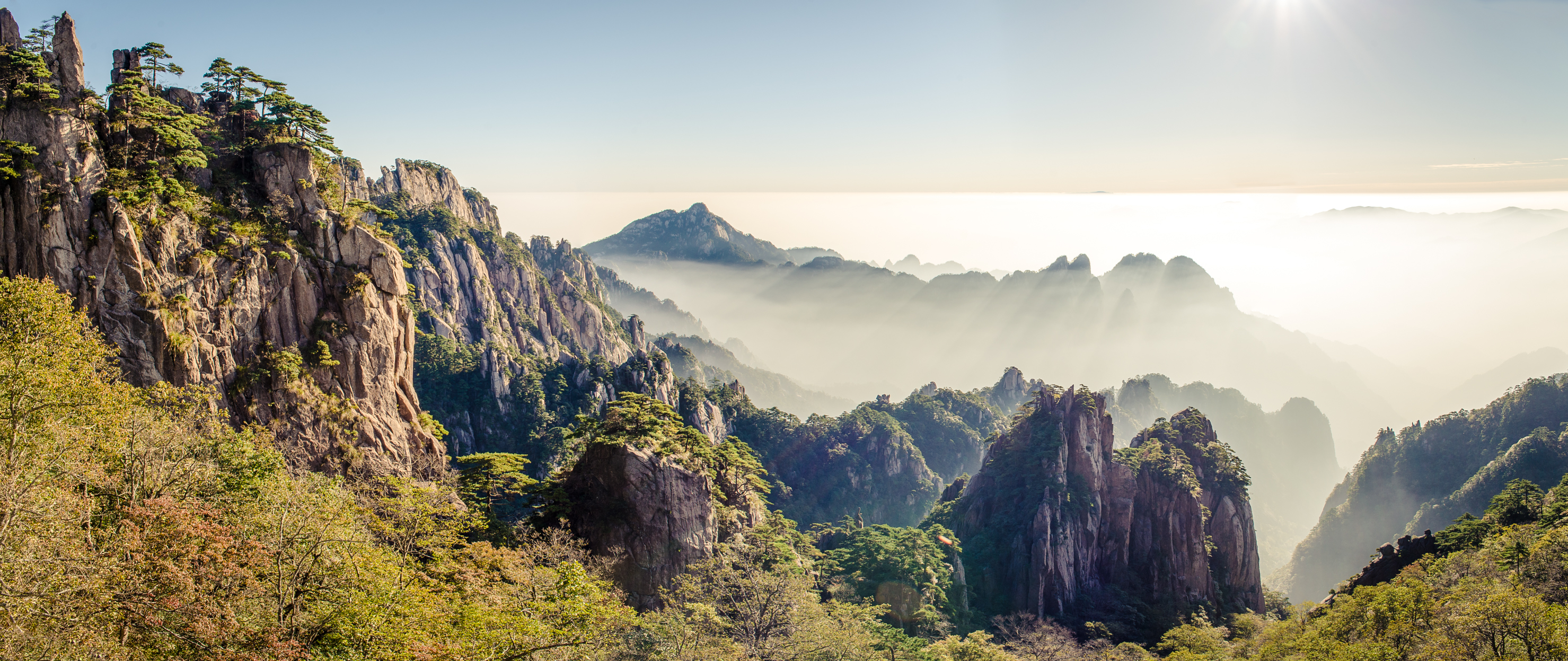 El parque nacional de HuangShan. Un espectacular paisaje de montañas rocosas por encima de las nubes.